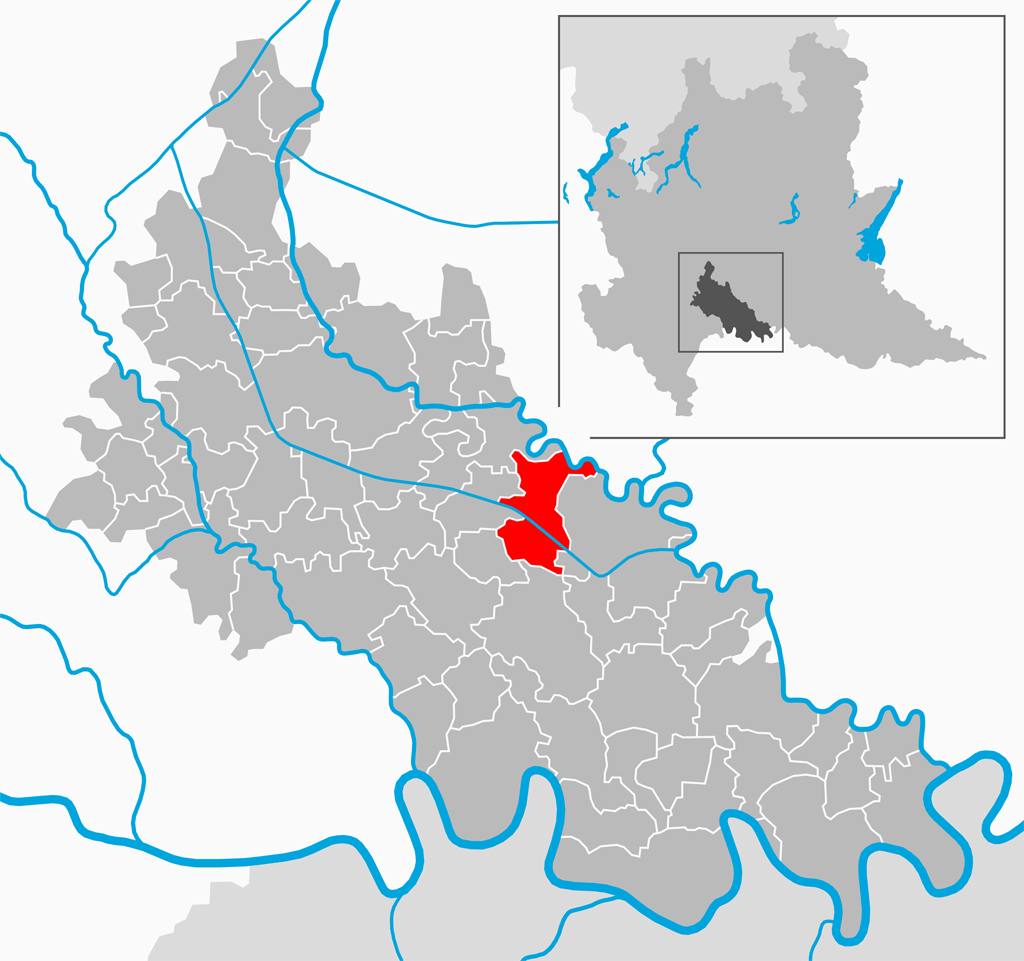 Il comune di Turano Lodigiano nella provincia di Lodi